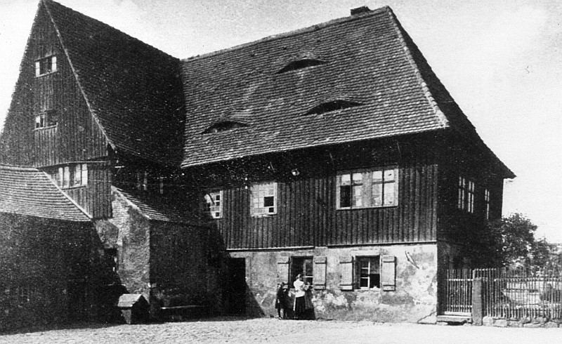 Original image description from the Deutsche Fotothek Freital-Döhlen. Alte Rote Mühle, aus: Meiche 1927